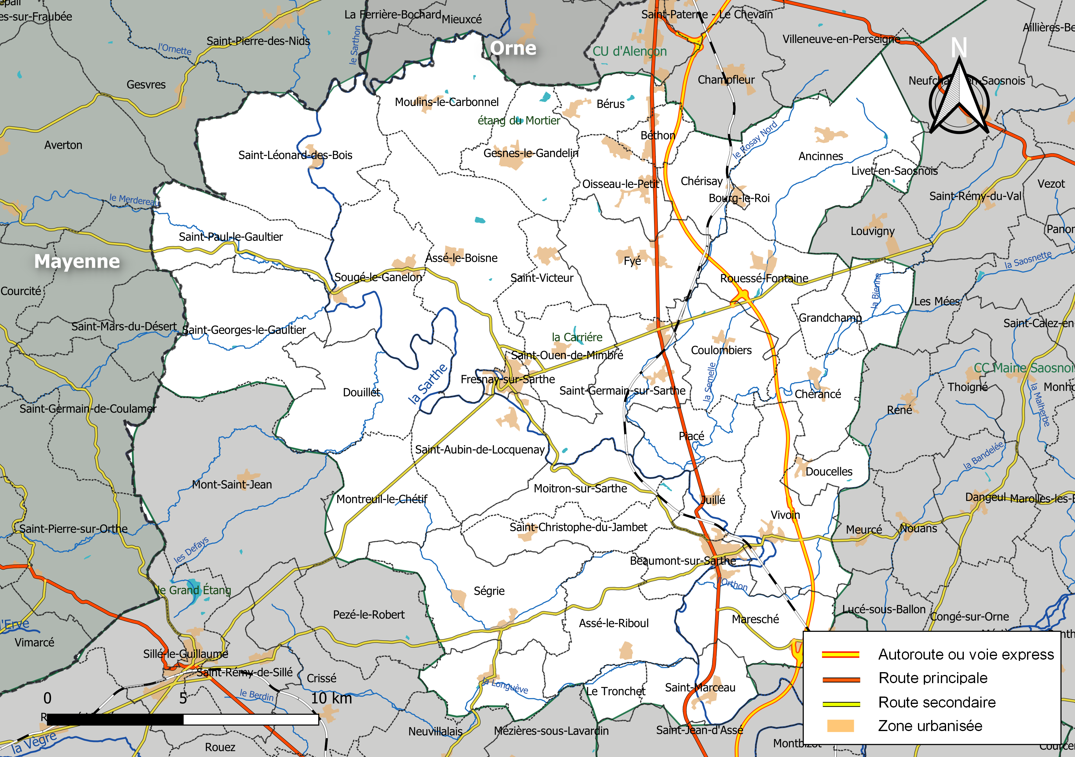 Carte géographique de la Communauté de communes Haute Sarthe Alpes Mancelles, département de la Sarthe, France. Composition au 1er janvier 2019.